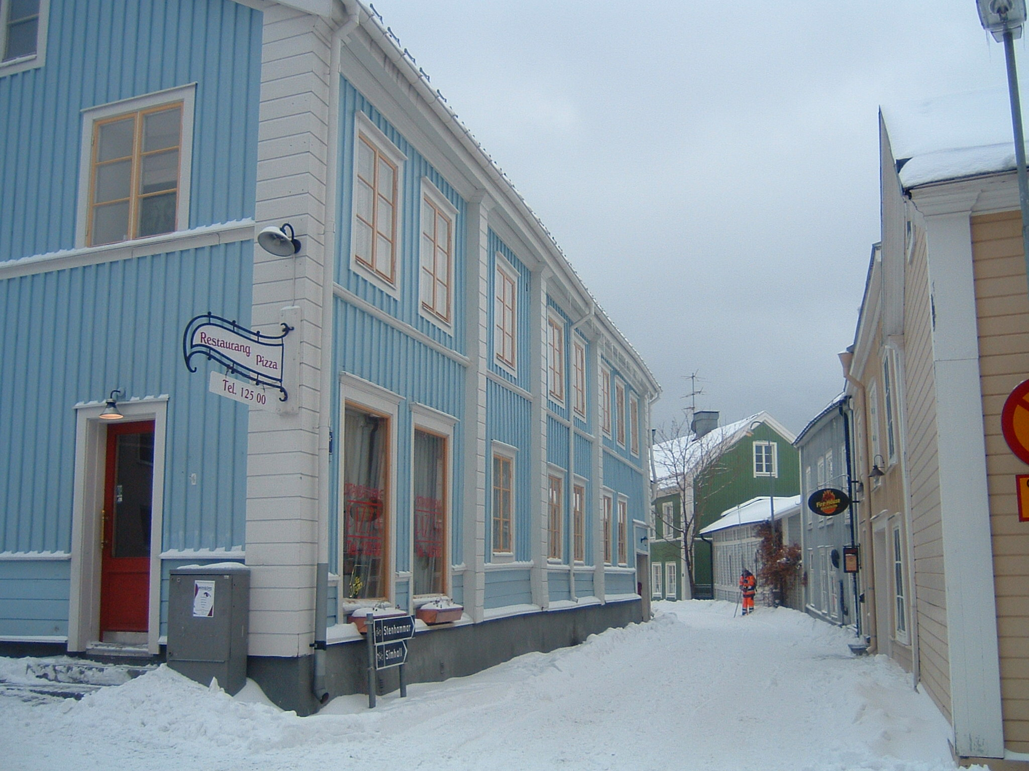 Östanbäcksgatan in Härnösand, Sweden. View from Färgaregränd crossing a winter day in 2006.